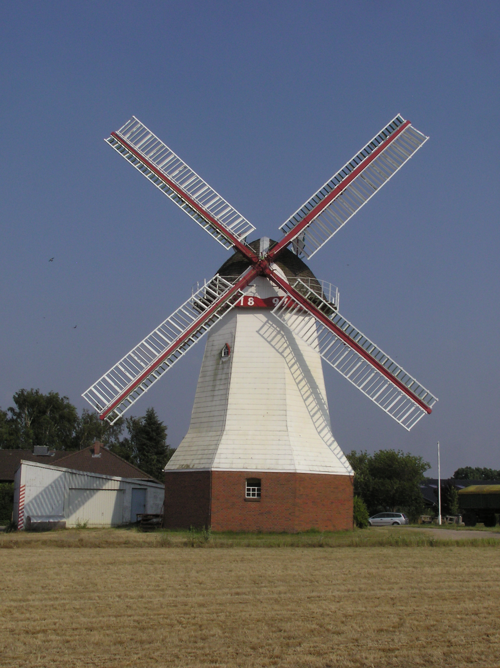 Windmill Eyendorf,NS,Germany